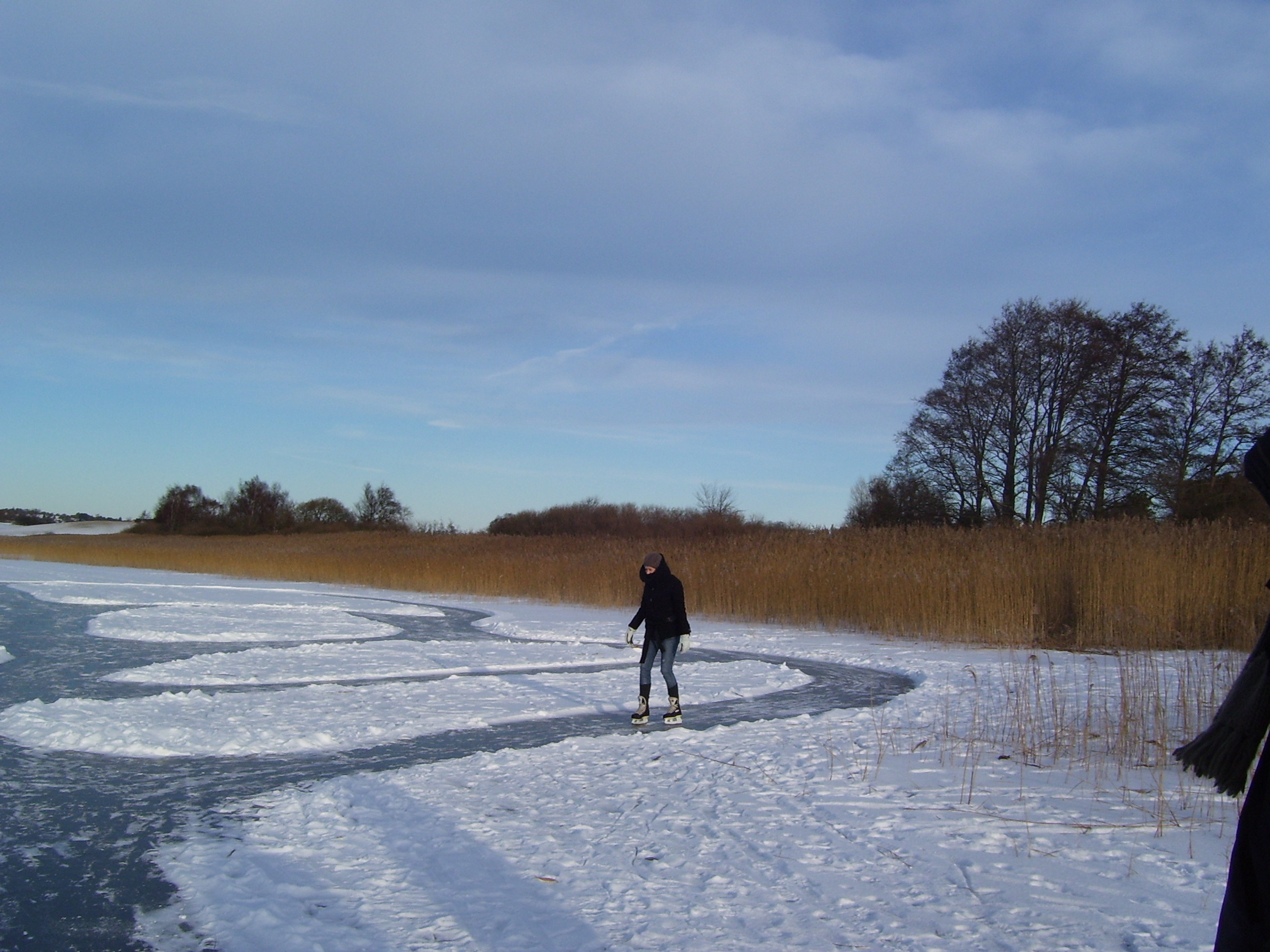 Skøjteløb på Arresø, feb. 2010